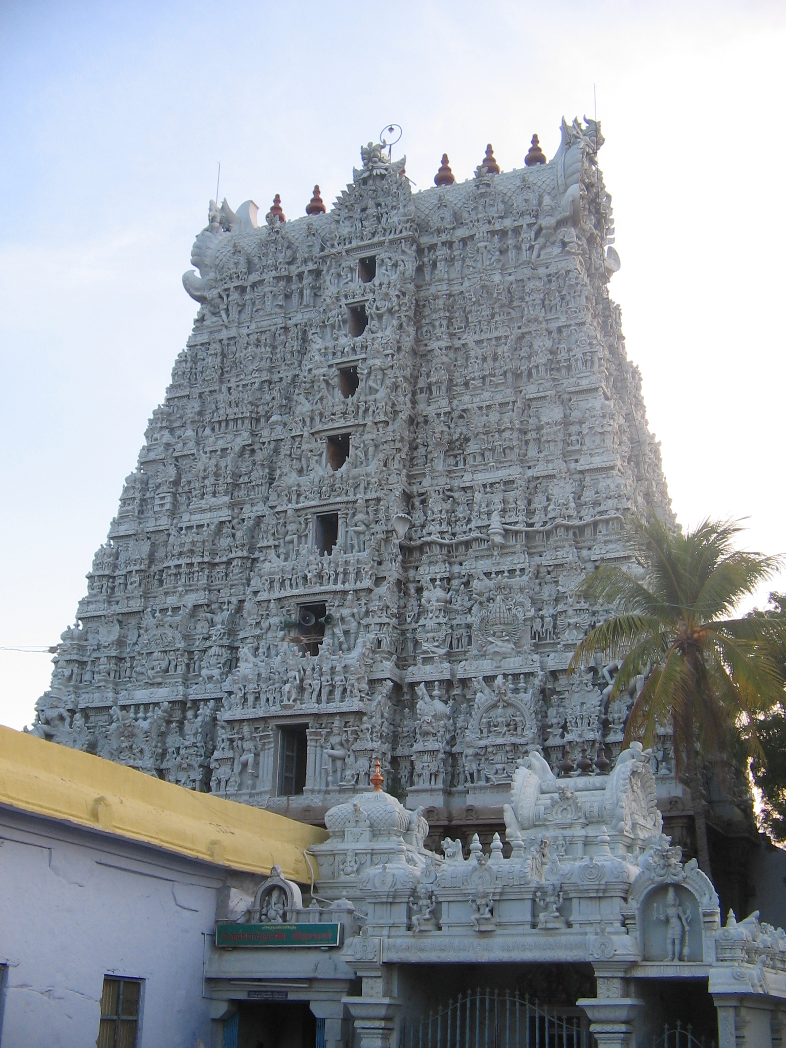 Thanumalayan Temple in Suchindram, Tamil Nadu, India.